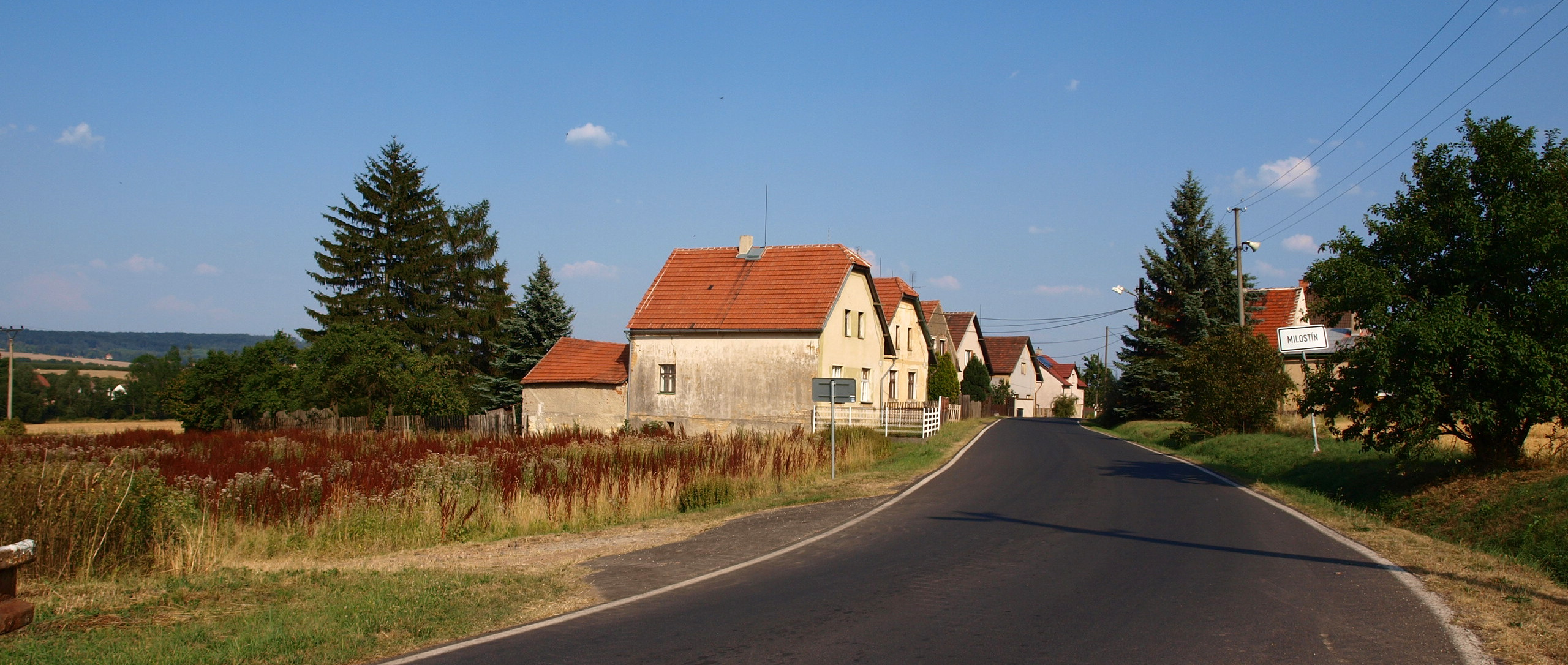 Milostín od hřbitova